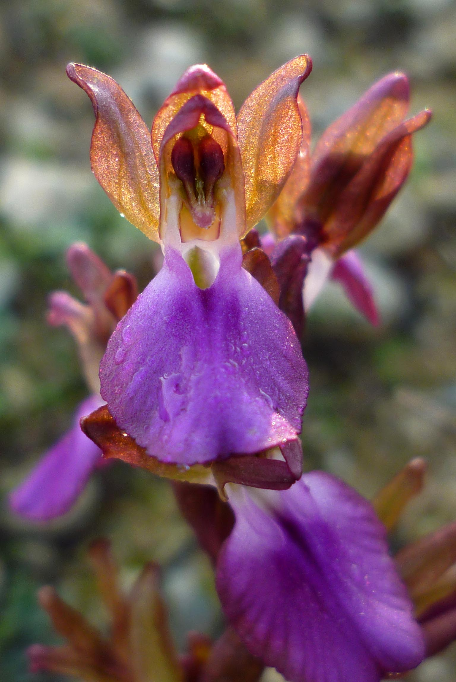 Orchis collina en Canteras, Cartagena, España.